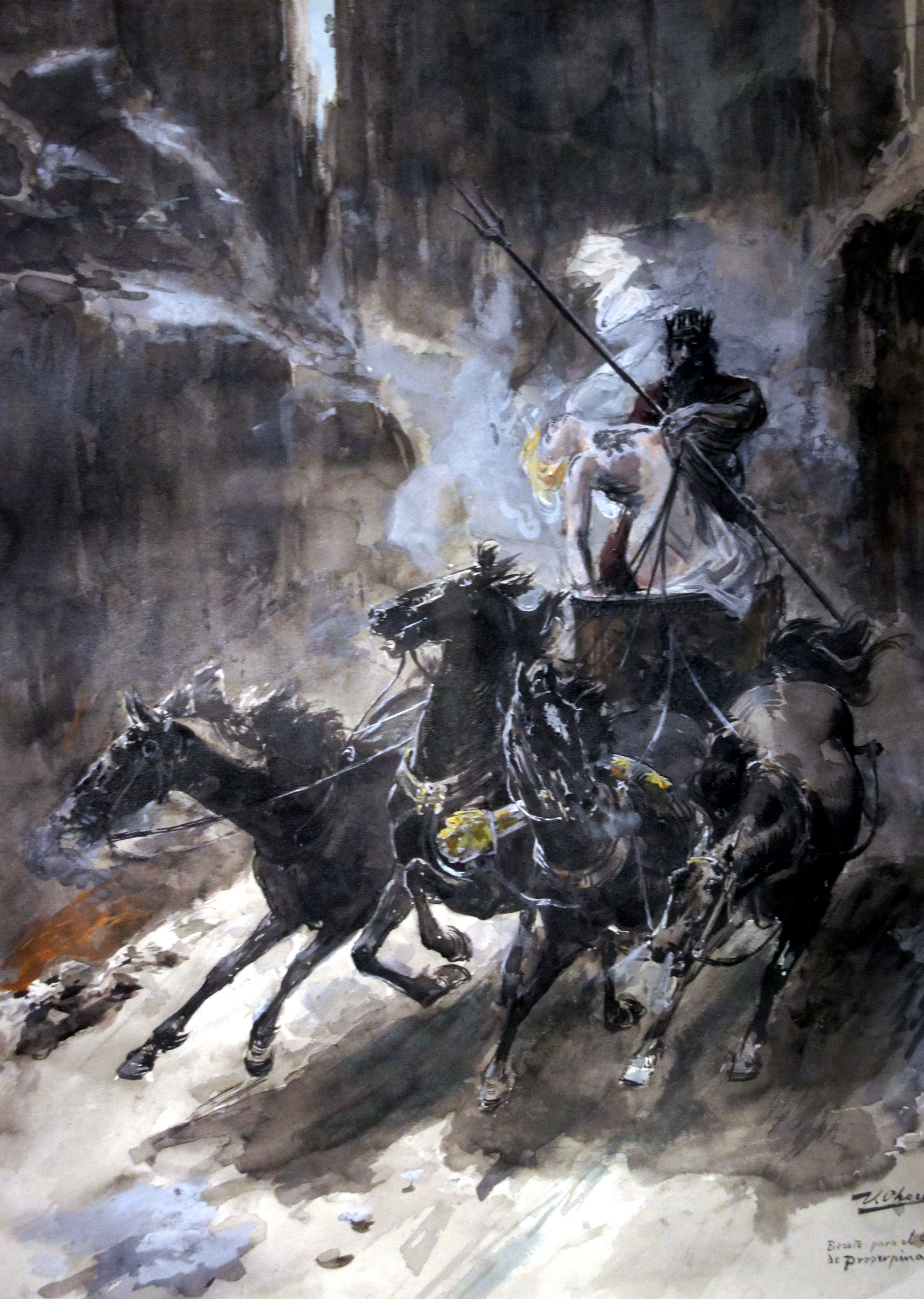 El rapto de Proserpina. Tinta china, aguada, plumilla y gouache sobre papel. 59 x 44,2 cm. Ulpiano Checa (1860–1916) DescriptionSpanish painter, sculptor, poster artist and illustratorDate of birth/death 3 April 1860 5 January 1916Location of birth/death Colmenar de Oreja DaxWork location Madrid, Rome, ParisAuthority control : Q2627916 VIAF: 64279729 ISNI: 0000 0001 1572 8107 ULAN: 500023133 LCCN: n96011518 GND: 13191393X WorldCat creator QS:P170,Q2627916 1888.